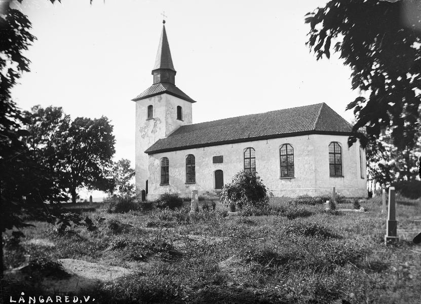 Kyrkan från sydöst. Snabbinv.